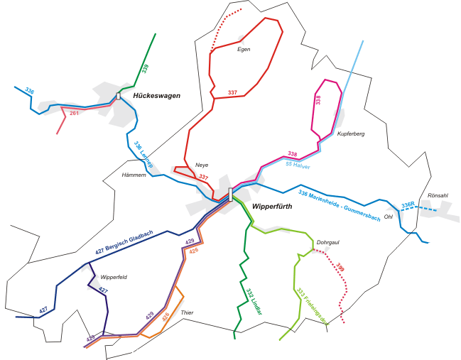 ÖPNV in Wipperfürth Danke an JensD für die Herstellung. (von JensD erstellt)